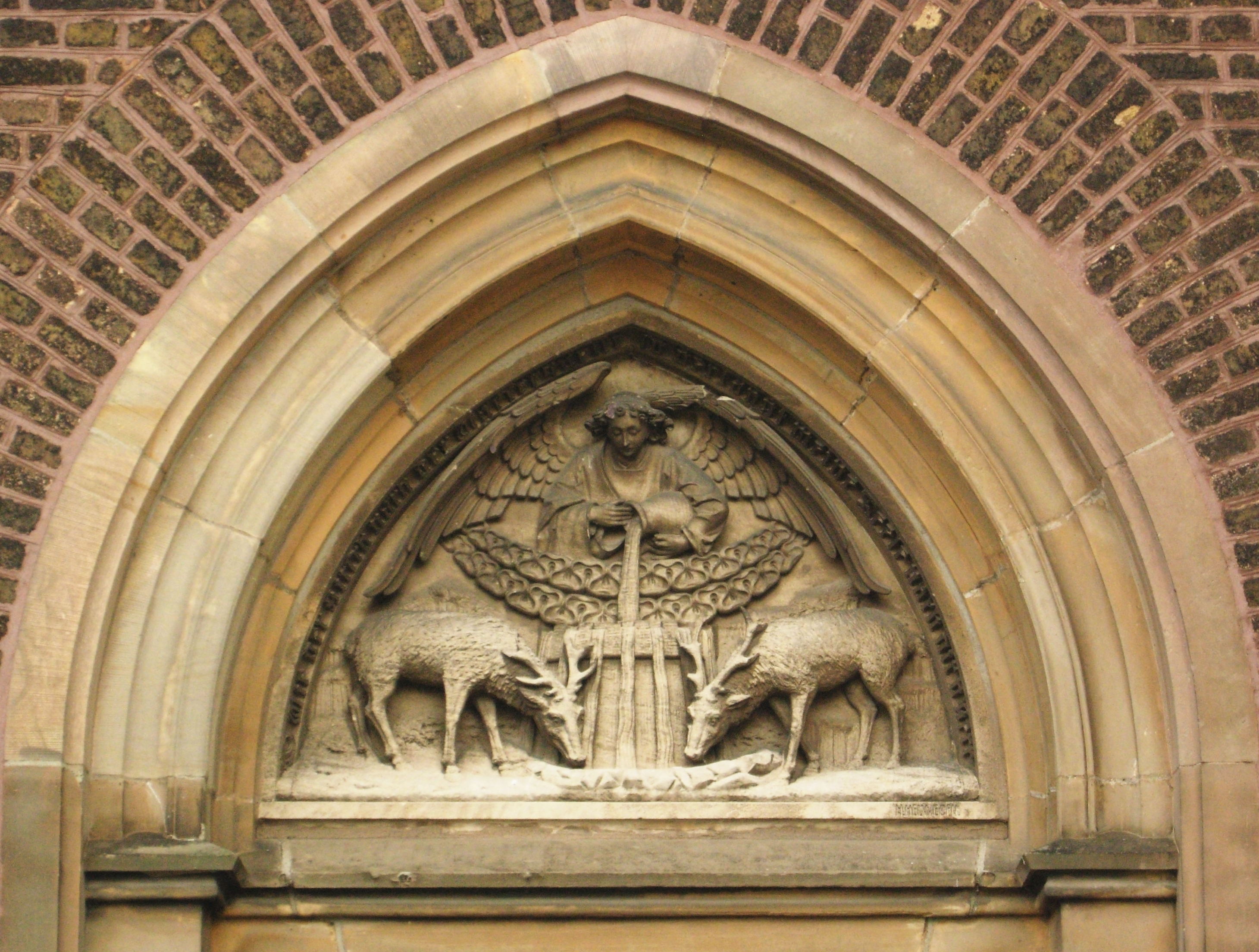 Tympanon über dem nördlichen Seiteneingang der Thomaskirche in Wesseling-Urfeld; das Relief bezieht sich auf Psalm 42; die schwer lesbare Frakturschrift im Spitzbogen lautet: Wie der Hirsch nach der Wasserquelle, so verlangt meine Seele nach dir, o Gott. Die Signatur rechts unter dem Relief weist auf den Bildhauer Henri Helwegen; Näheres über ihn in der Beschreibung zum Foto Adultera